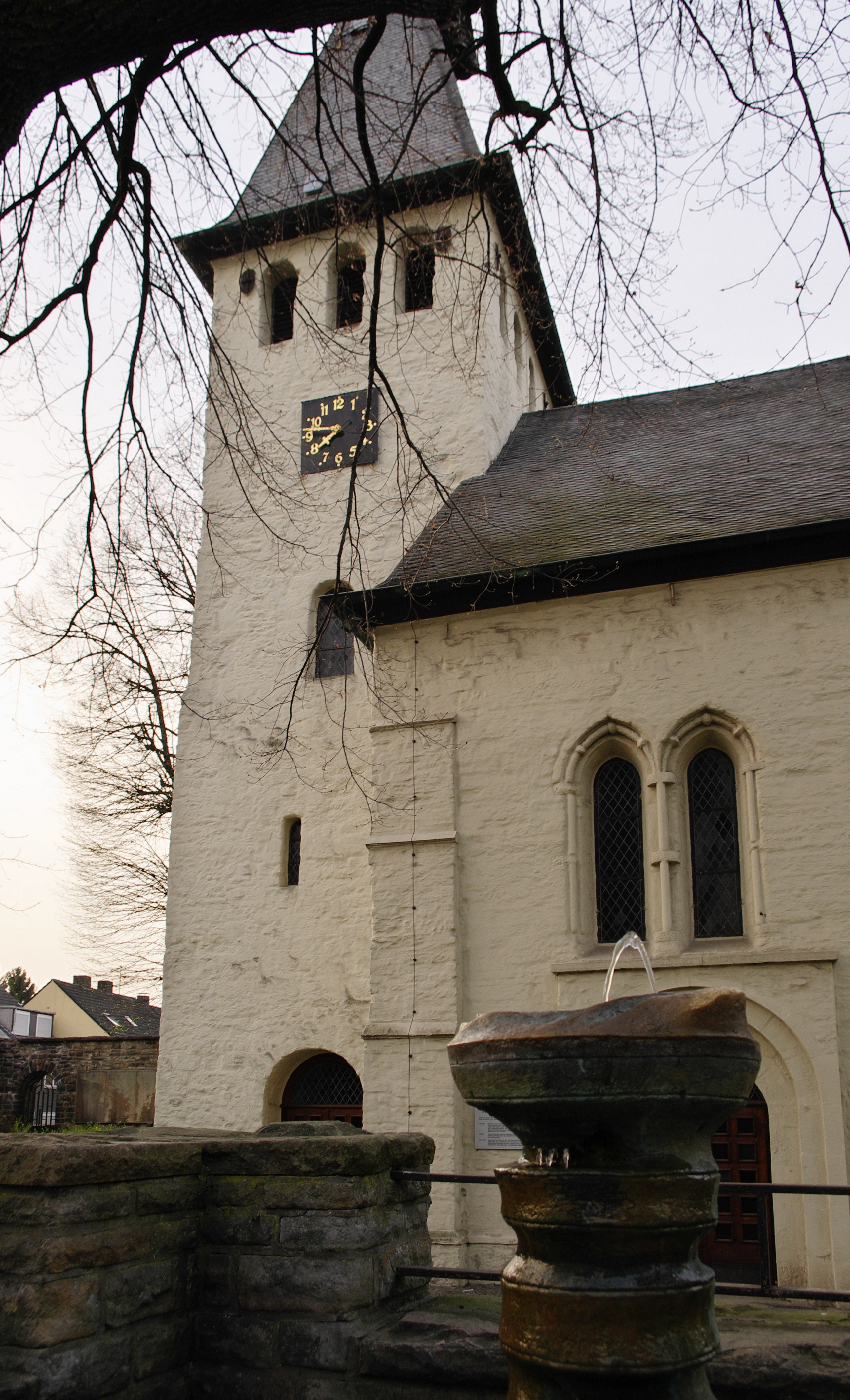 Ev. Kirche in Dortmund Wickede This is a photograph of an architectural monument. 0281